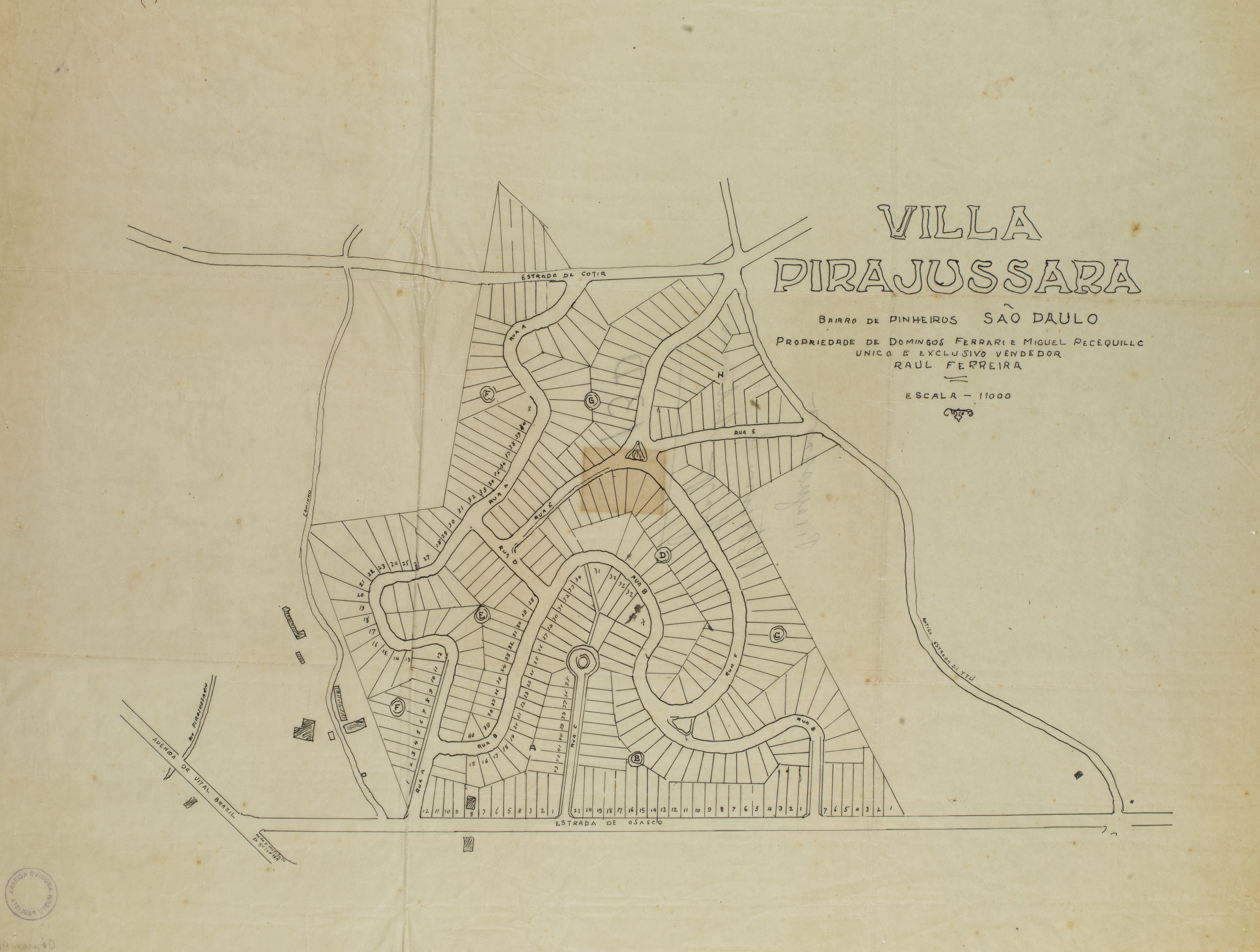 Obra que integra o acervo do Museu Paulista da USP. Coleção João Baptista de Campos Aguirra